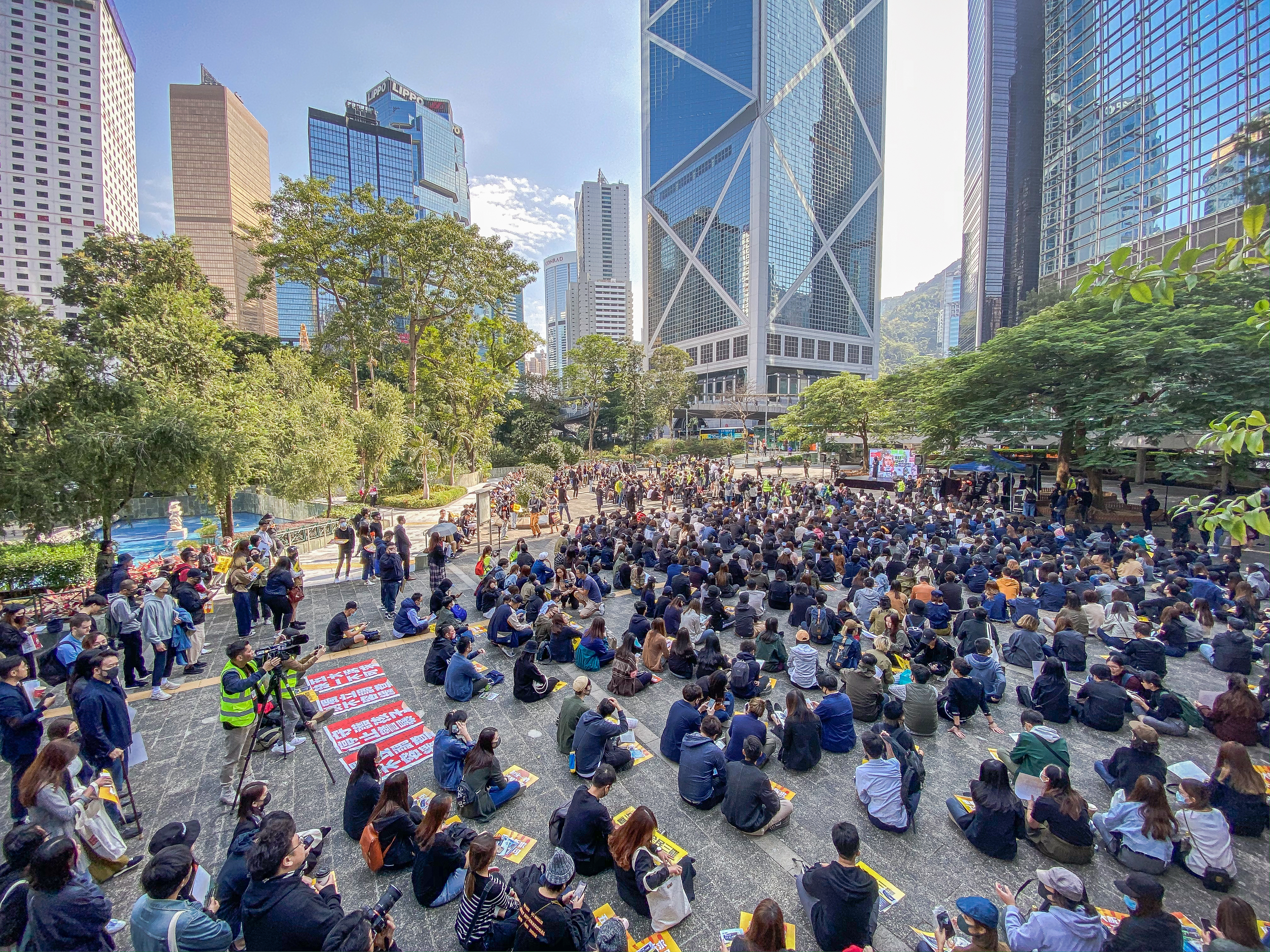 2019.12.02 廣告界5天罷工 暨 12.2集會